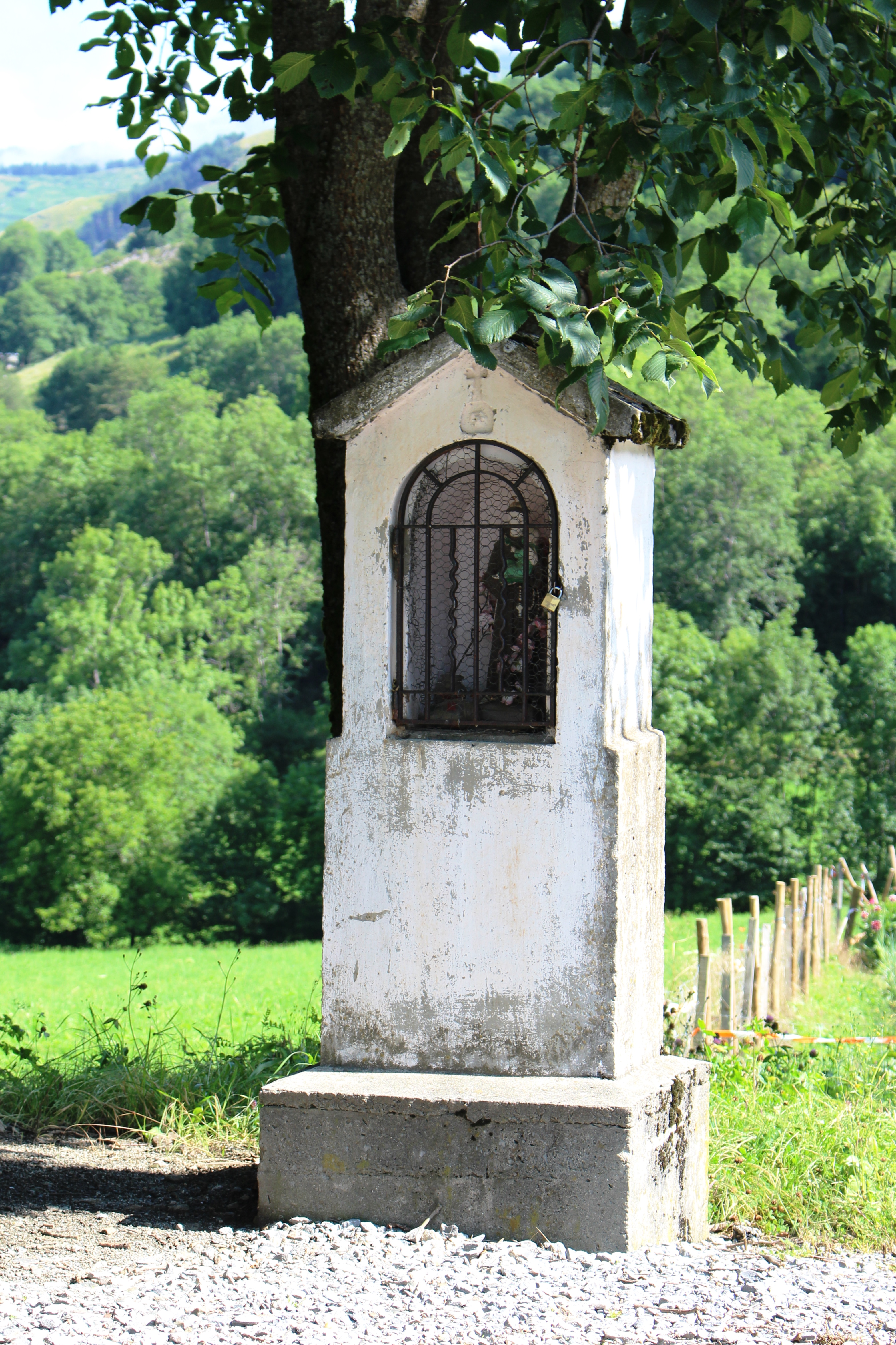 Oratoire de Loudervielle (Hautes-Pyrénées)